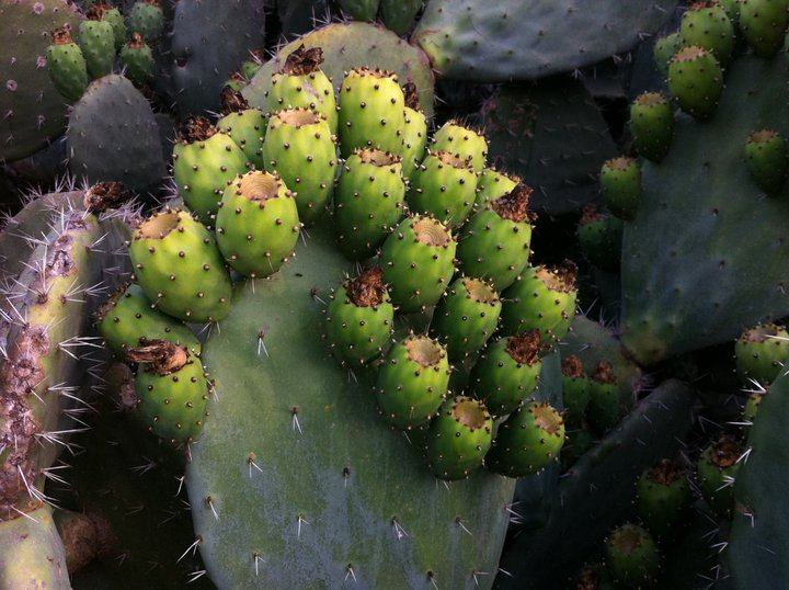 الصبار وثماره - شعار بلدة عبا